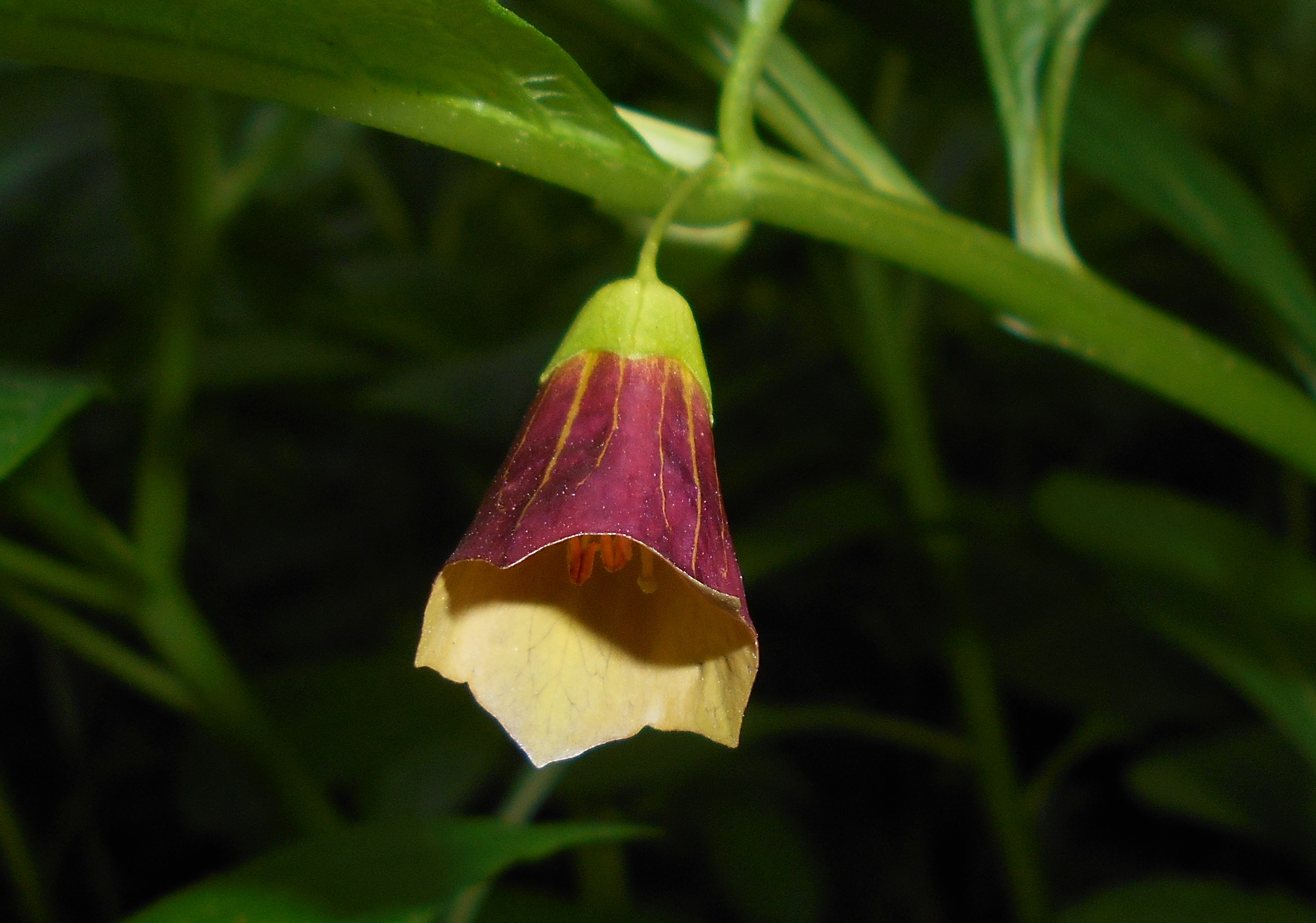 Lulecznica kraińska (Scopolia carniolica), Ogród Botaniczny UMCS w Lublinie